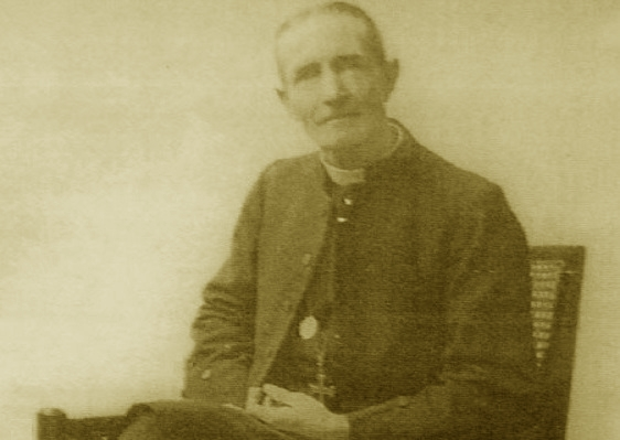 Le révérend John Jamieson Willis fondateur de la 2e plus ancienne école pour les Africains au Kenya